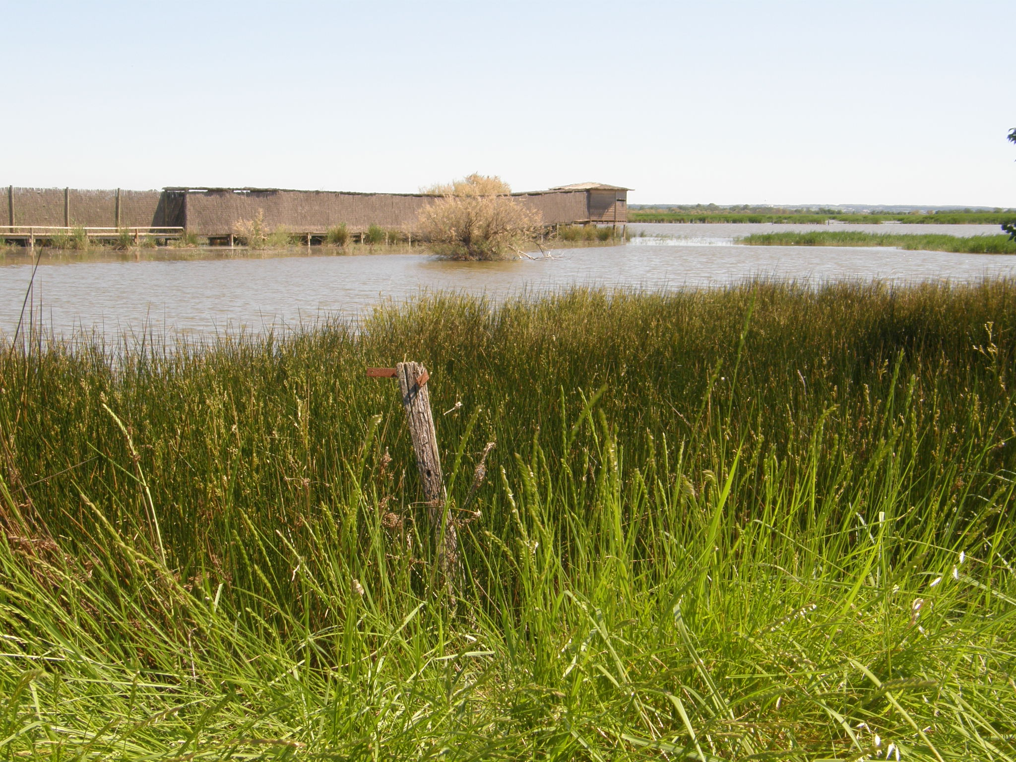 Marais de la réserve naturelle régionale de Mahistre et Musette (Gard, France)